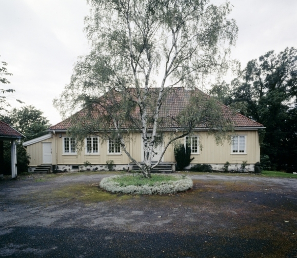 Våningshuset på Lille Frøen sett fra gårdsplassen